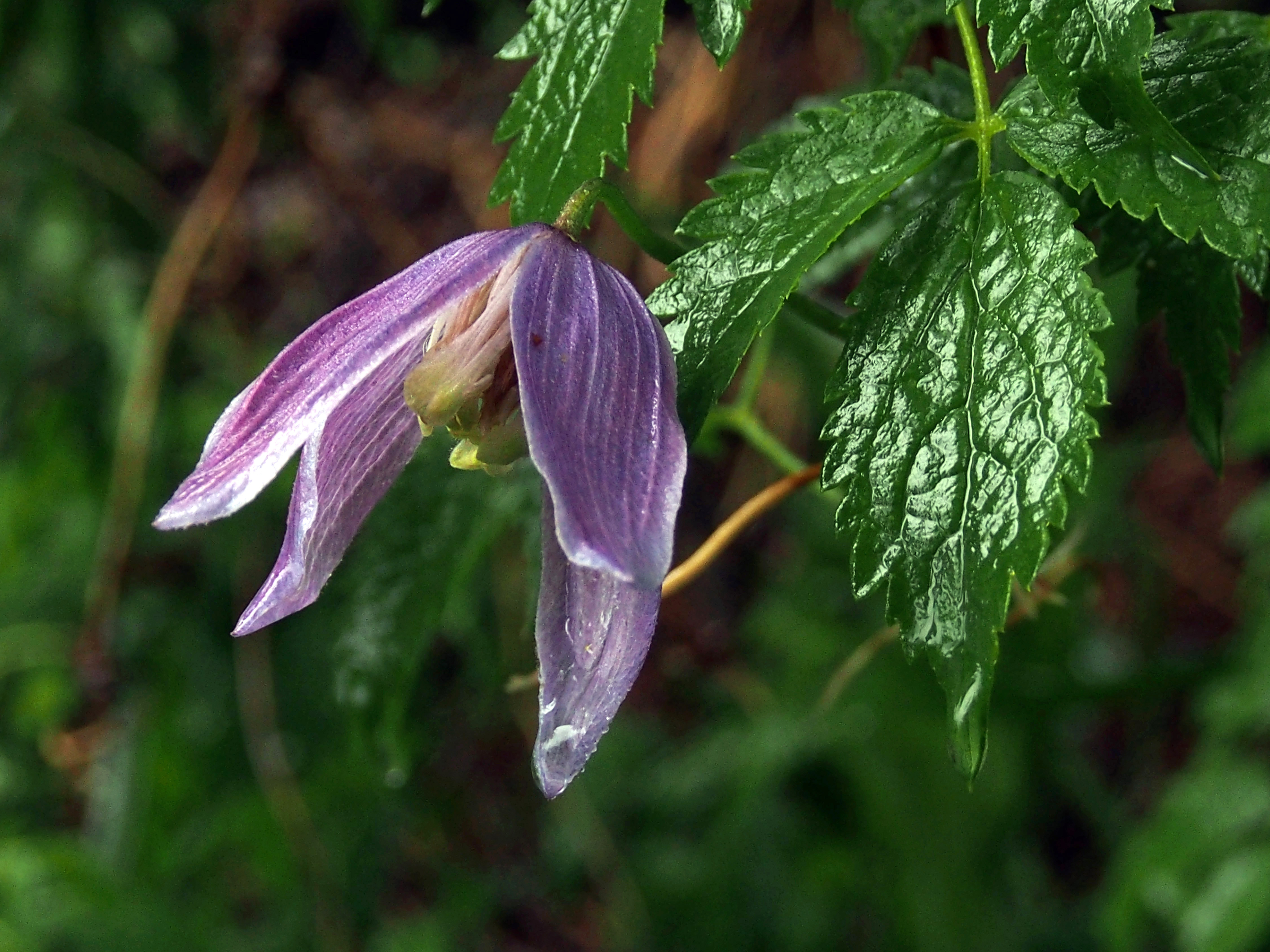 Beschreibung kommt später